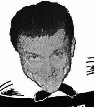 Barrett Deems